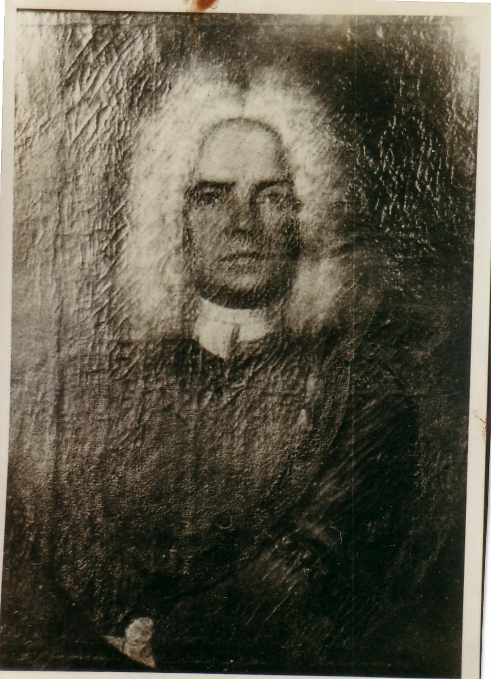 Hans Bastian III. v. Zehmen (11.06.1691 - 14.09.1763), Sächsischer Hof-, Justiz und Appellationsrat.